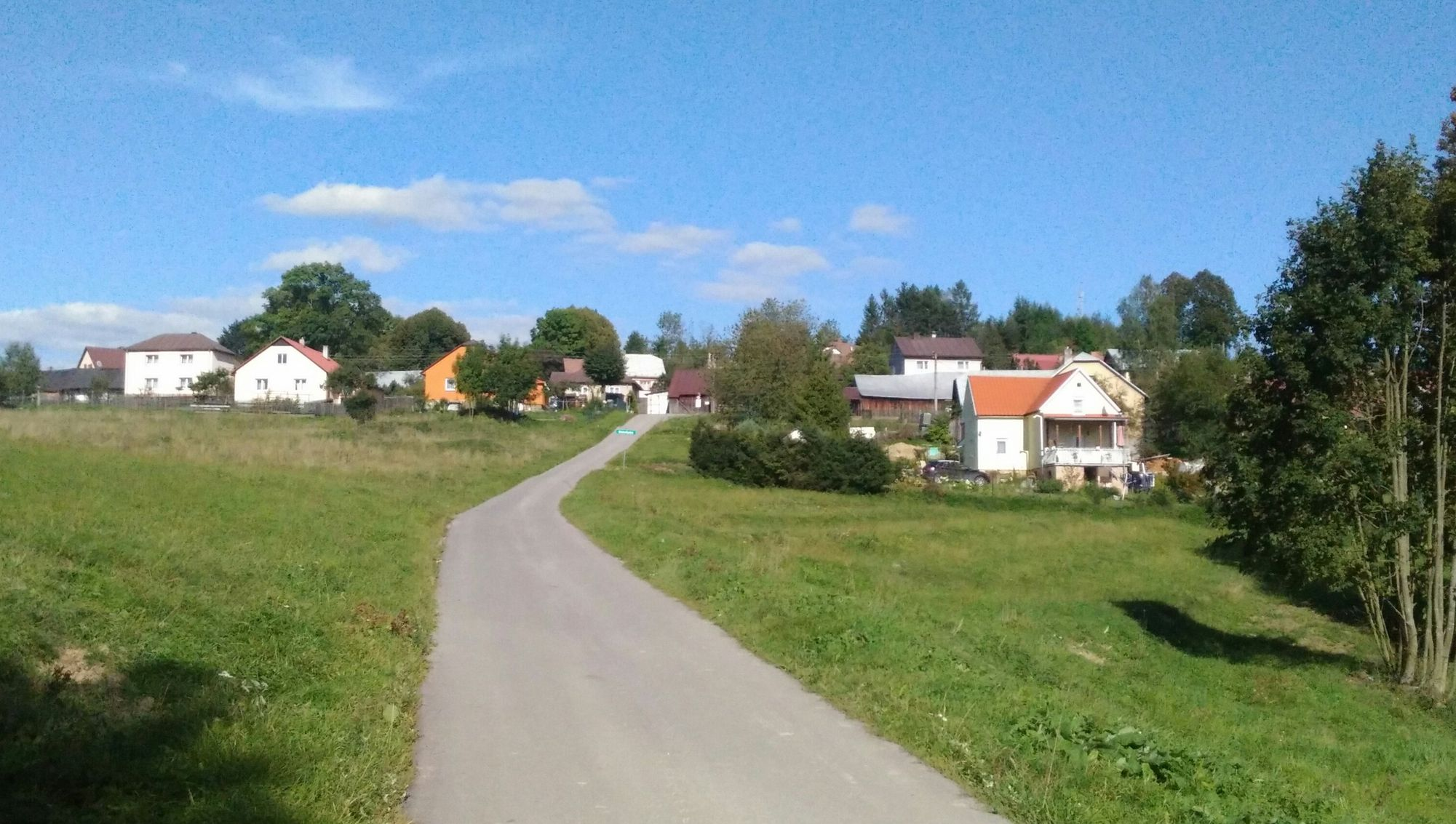 Osada Drahošanka, pohľad z hlavnej prístupovej cesty.